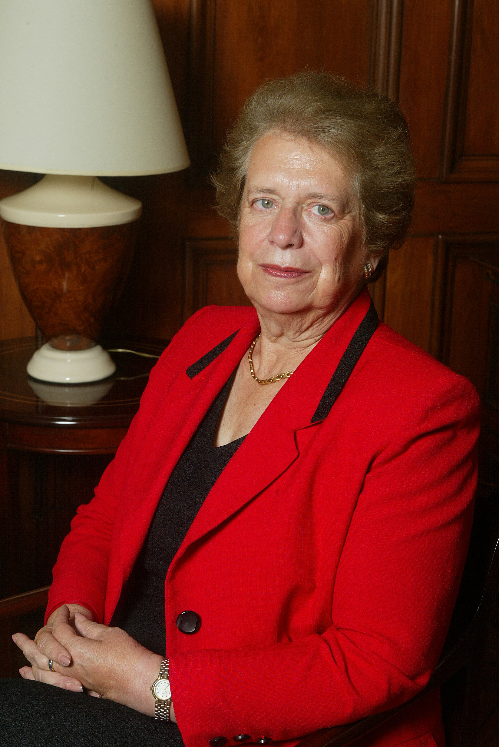 Ex Consejera del Banco Central de Chile